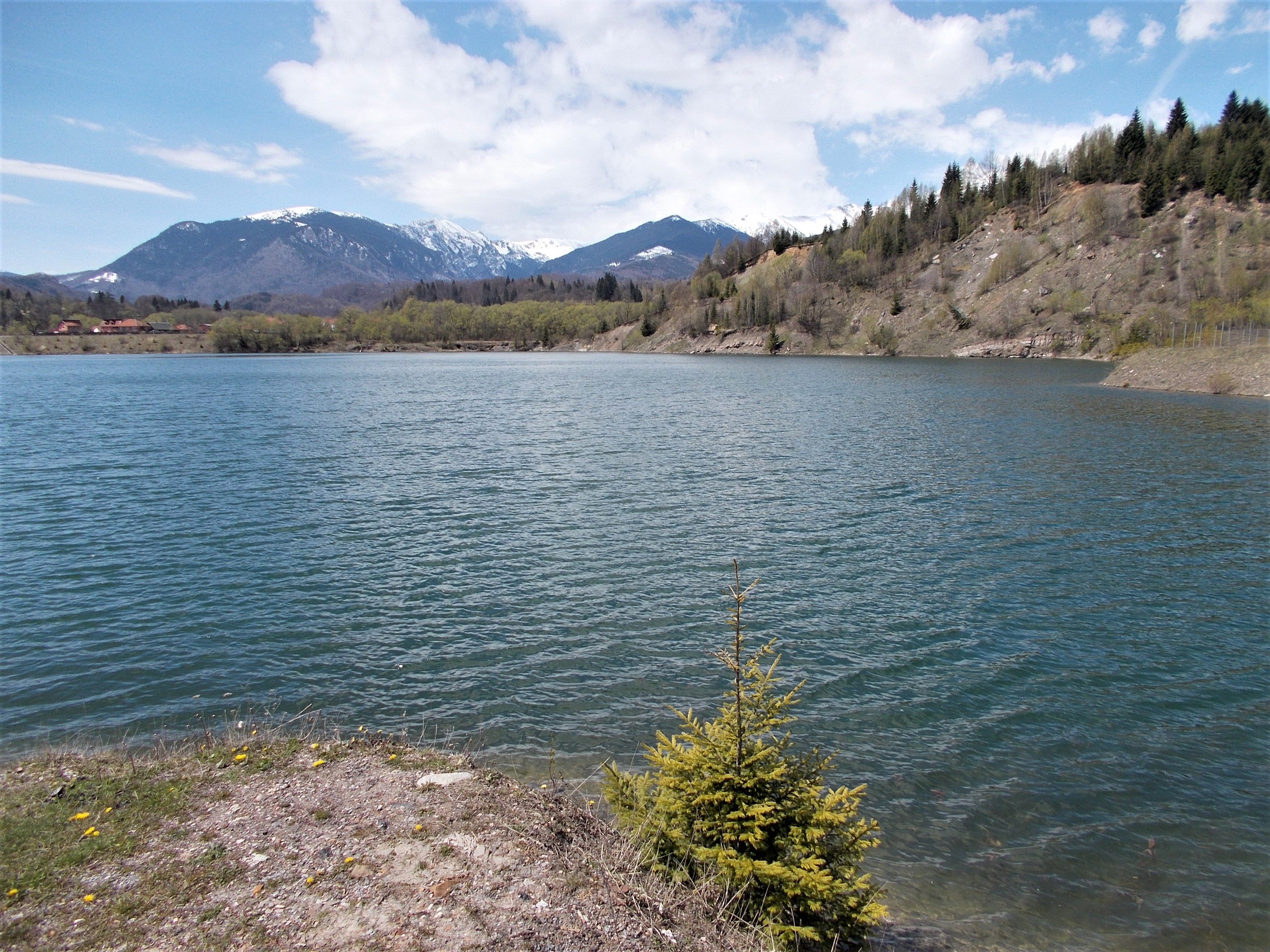 Lacul Câmpu lui Neag, județul Hunedoara